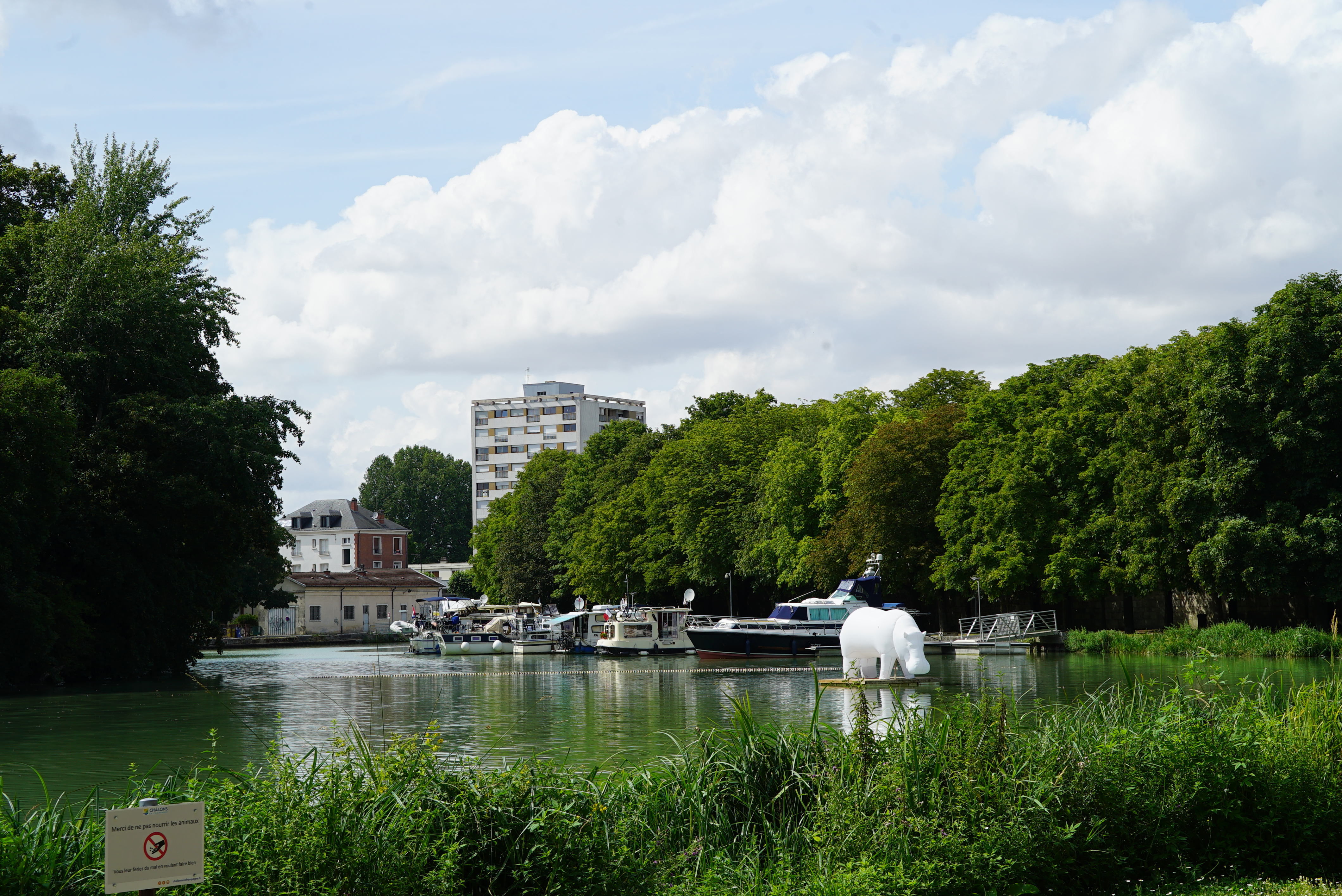 port sur la Manre à Châlons.